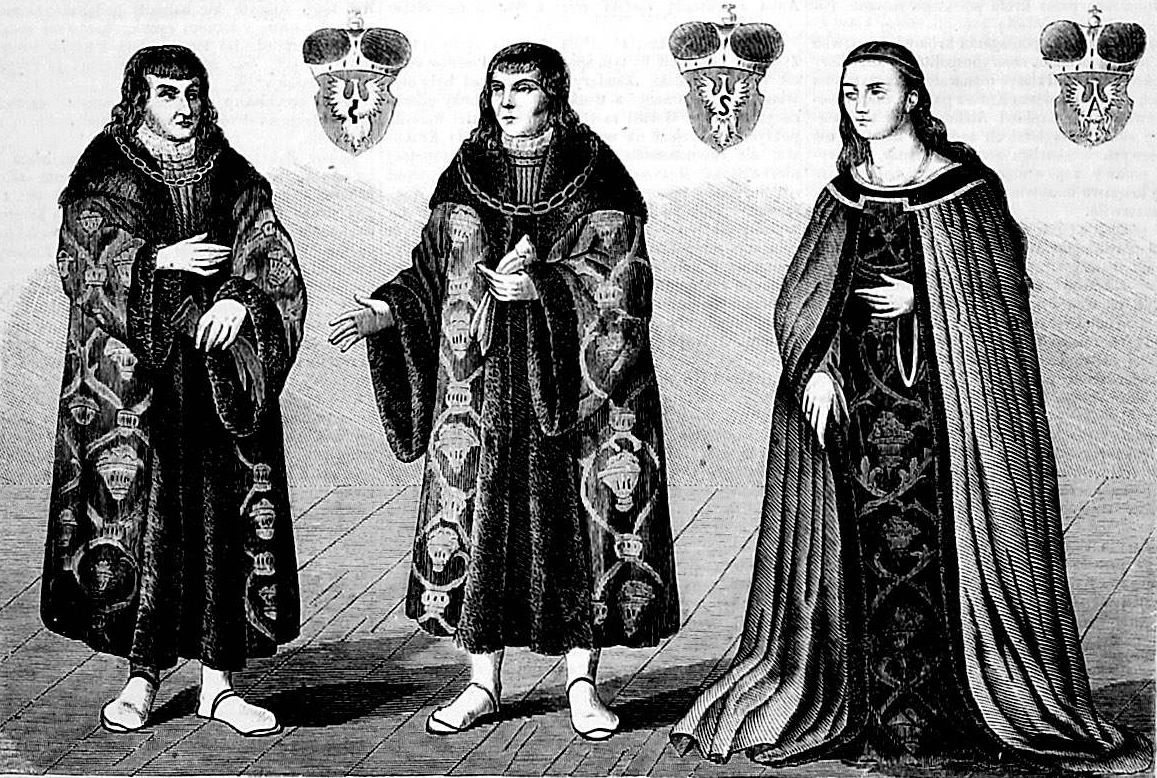 Ostatni książęta mazowieccy Janusz (1503-1526), Stanisław (1500-1524), Anna (1498-1557)